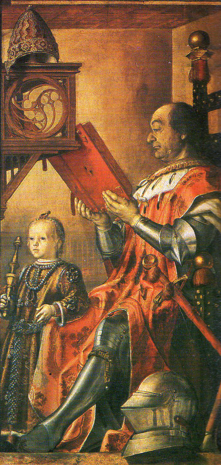 Federico da Monfeltro and his son